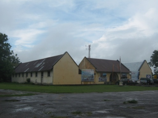 Benteng Van Der Capellen